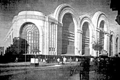 foto antigua del mercado